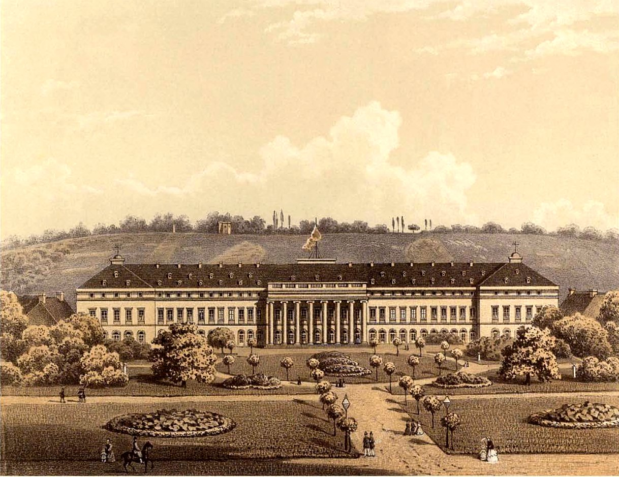 Kurfürstliches Schloss (Koblenz), Rheinprovinz